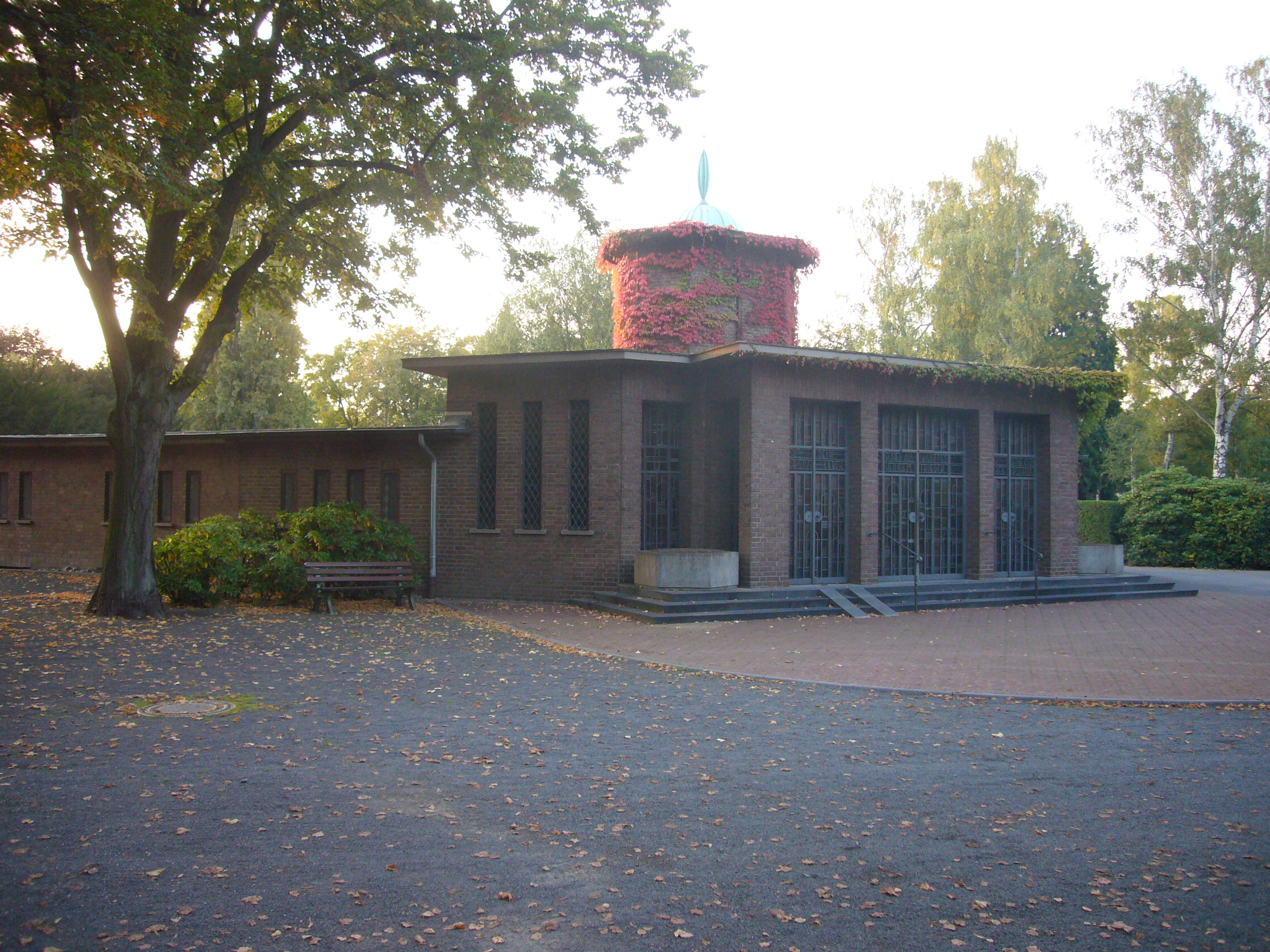 Kapelle des Zentralfriedhofs Bad Godesberg, Ortsteil Plittersdorf This image shows a heritage building in Germany, located in the North Rhine-Westphalian city Bonn (no. A 3436).